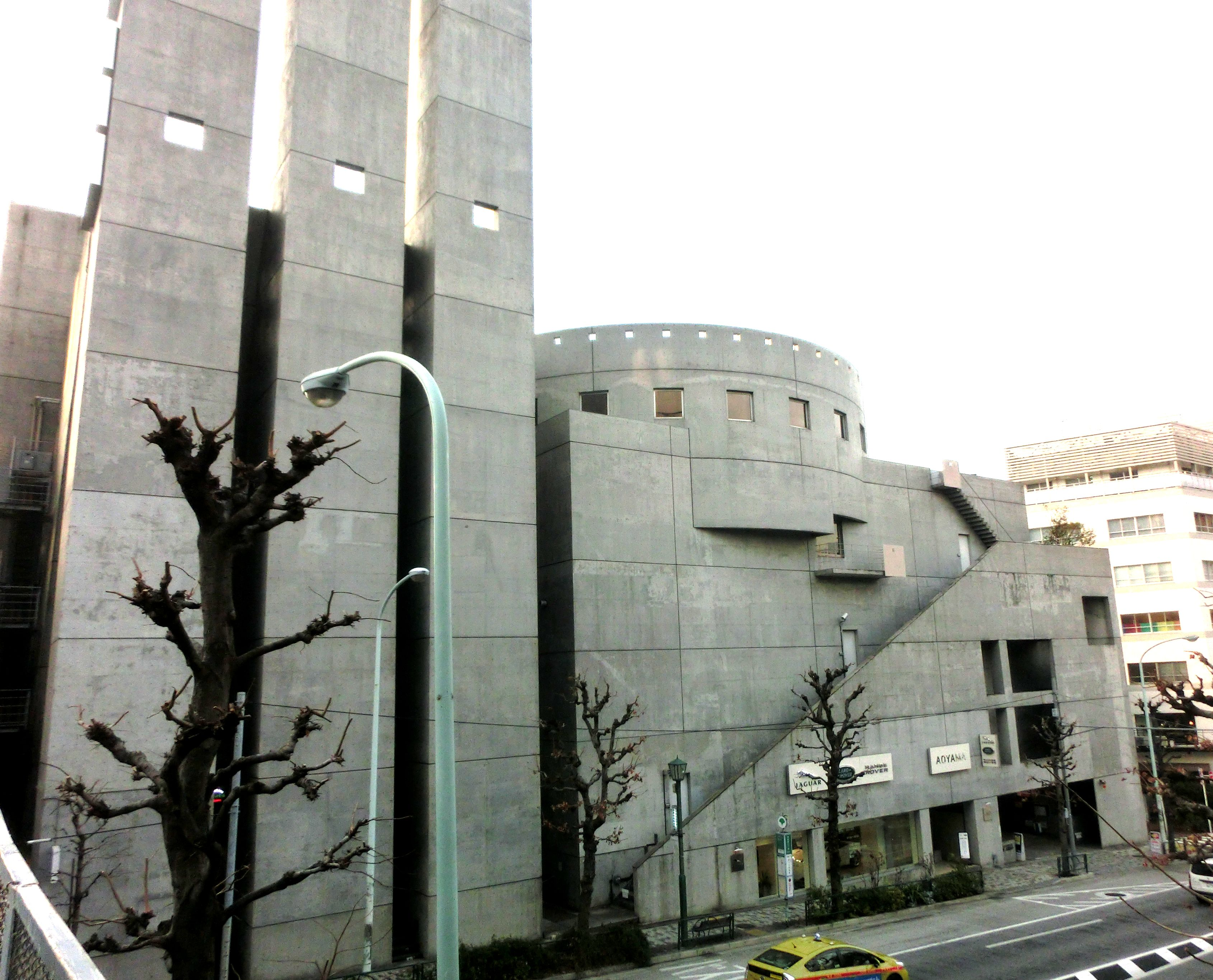 Chateau Amebaビル全景